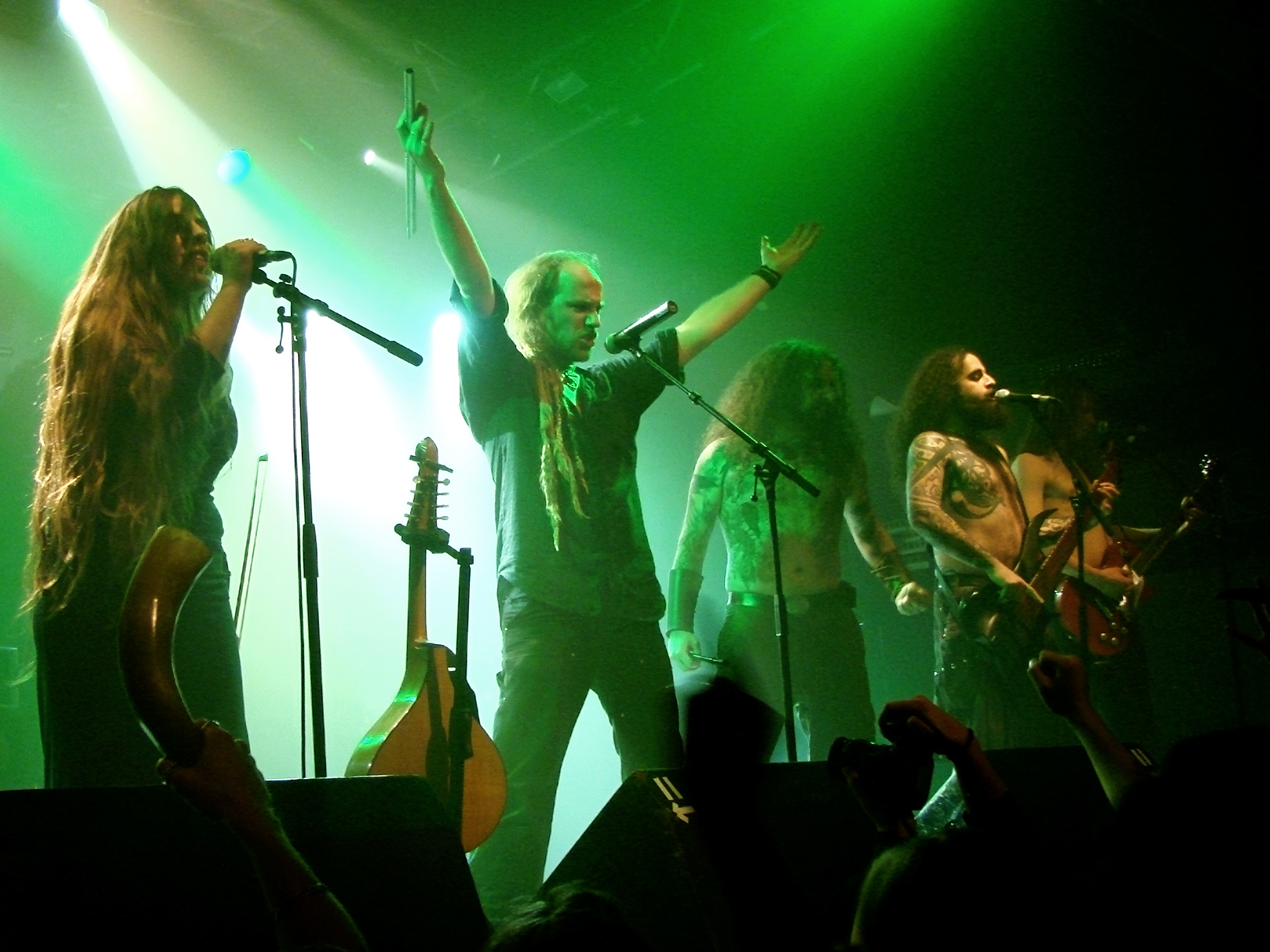 Eluveitie au Cernunnos Fest 07, le 16/12/07 à la Locomotive, Paris.